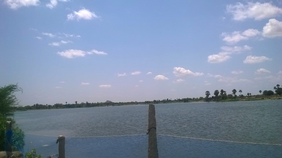 పల్లెర్ల చెరువు